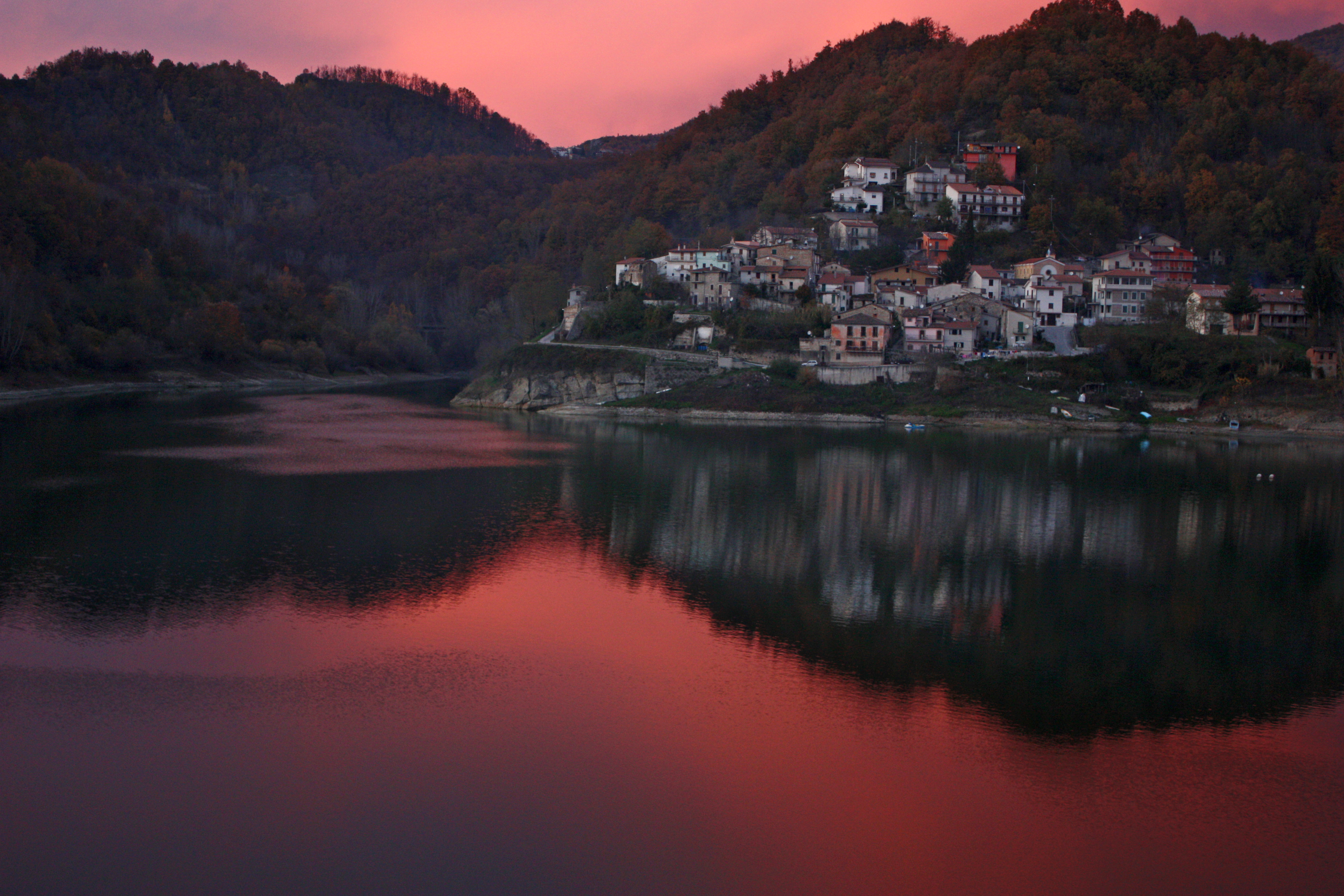 veduta di Fiumata